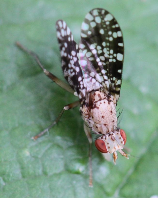 Trypetoptera punctulata am 21.8.2017 in der Schwetzinger Hardt